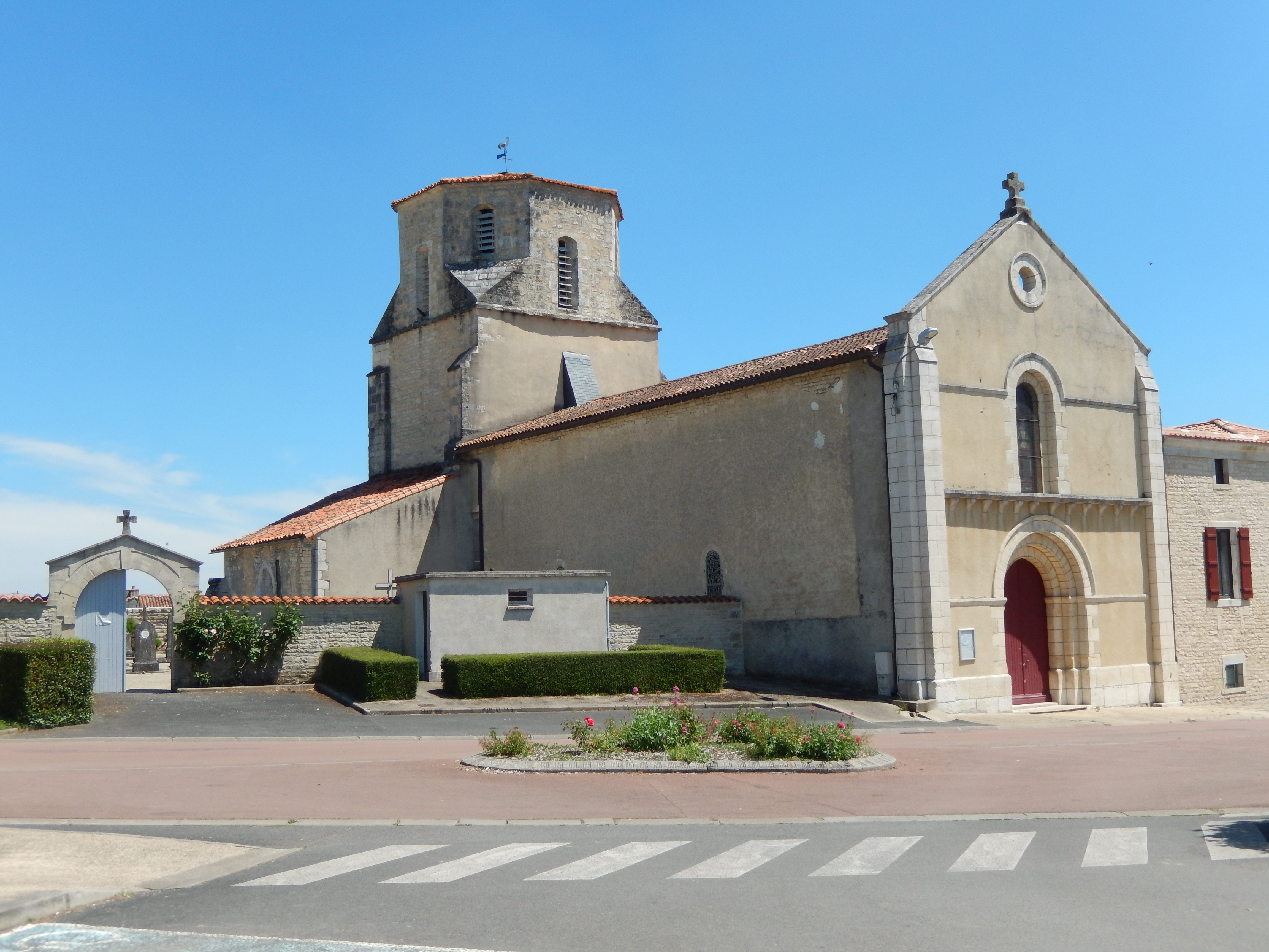 L'église Saint-Nicolas de Couture d'Argenson, dans les Deux-Sèvres.